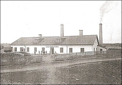 Sala kakel- och keramikfabrik (Sala Tile and Pottery Works), Sala, Sweden